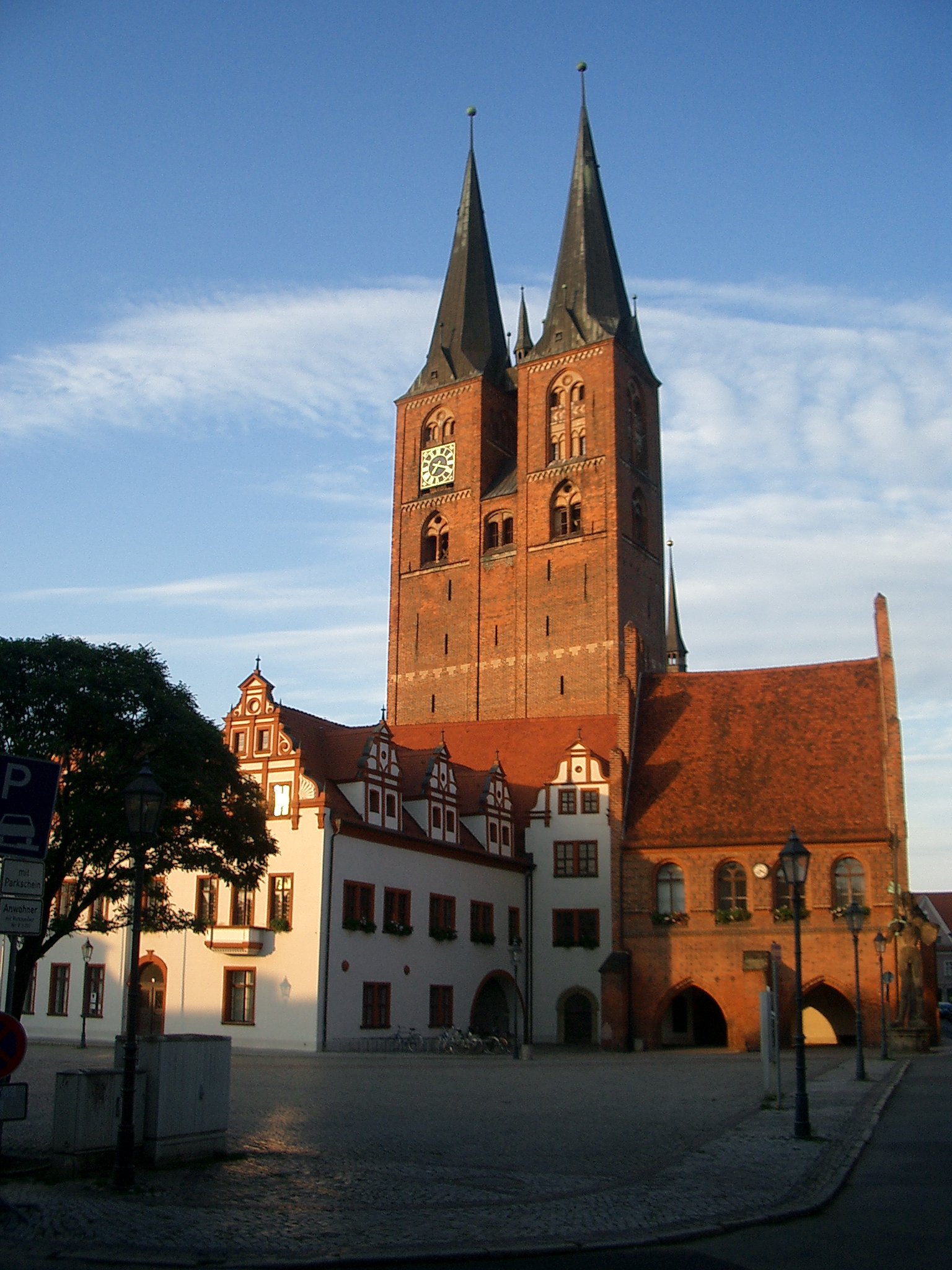 * Markt in Stendal mit Marienkirche, Rathaus und Roland